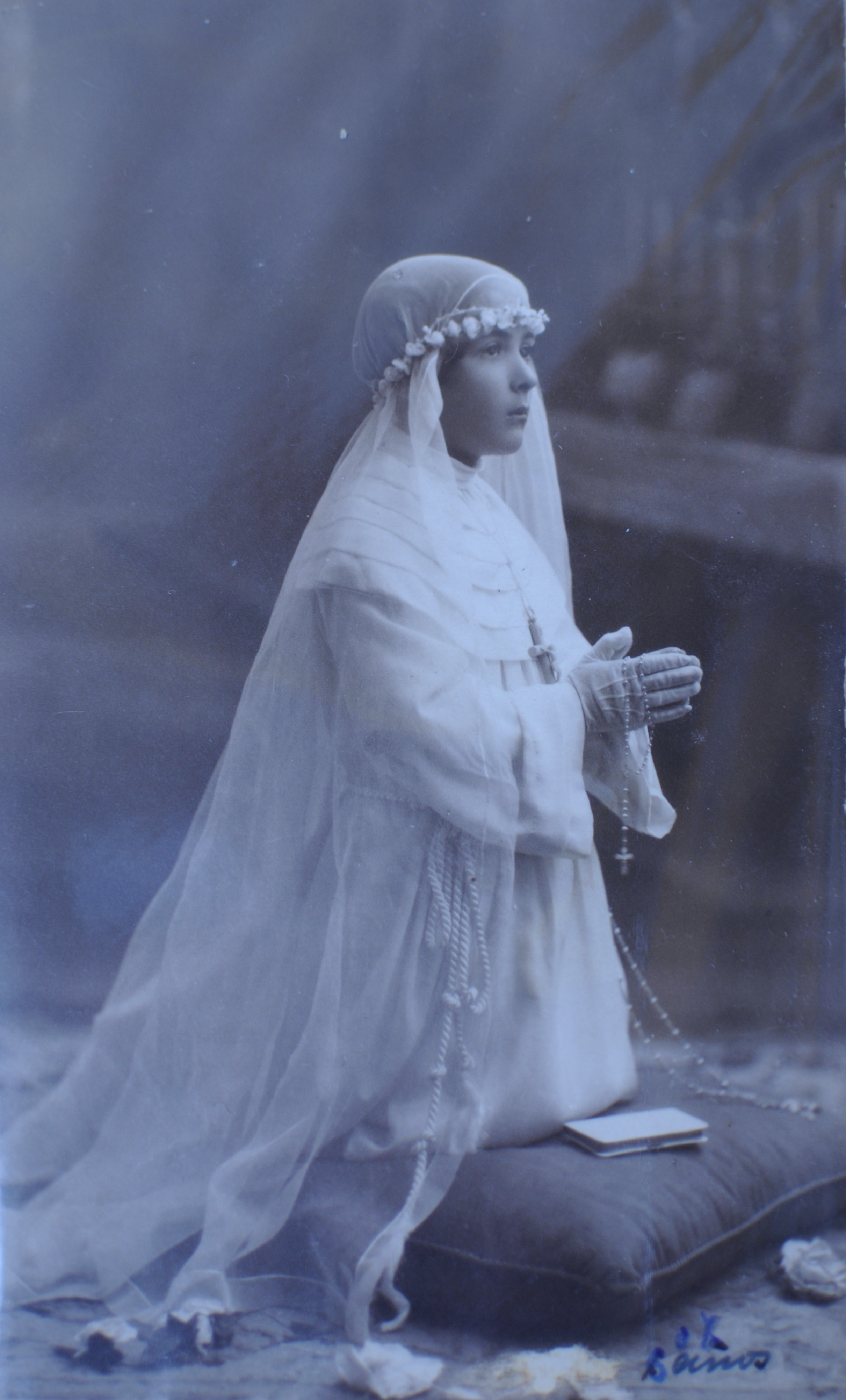 1ª Comunión en Colegio San José